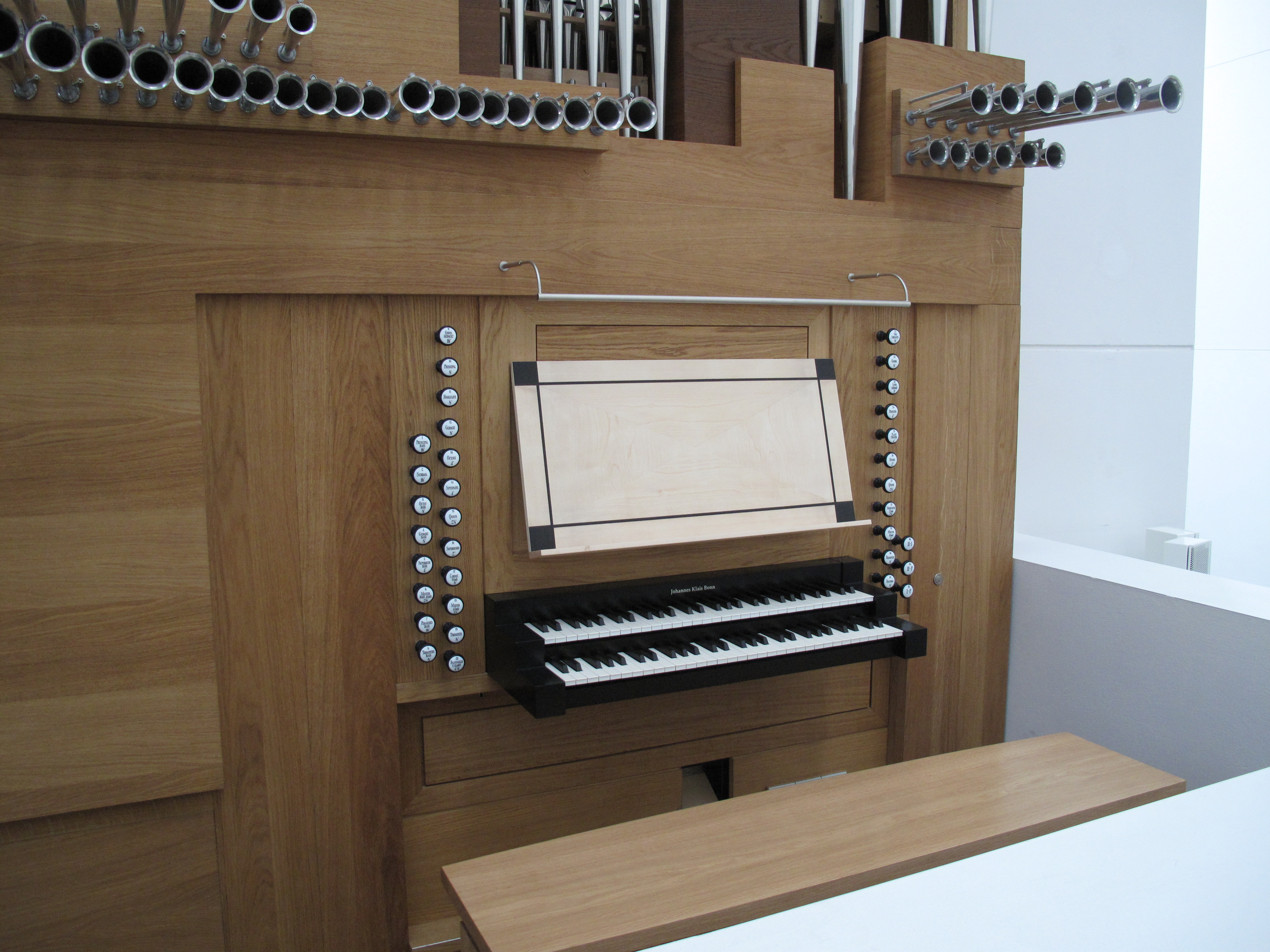 Iglesia de Iesu. Obra de Rafael Moneo.